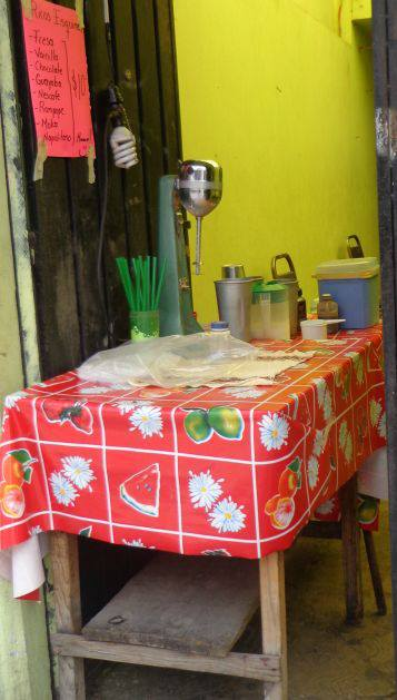 Este instrumento es con el que se realizan los eskimos